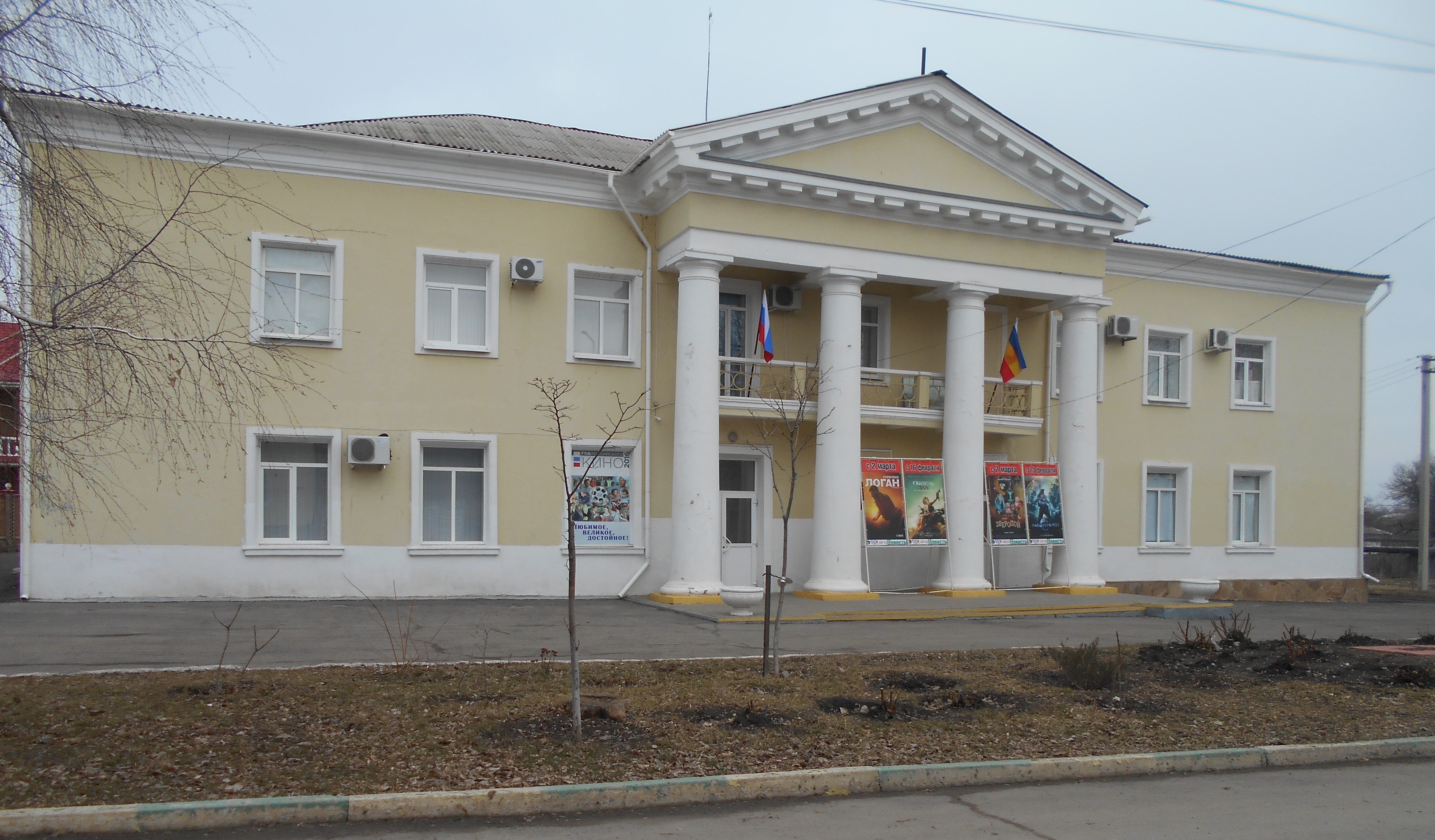 г. Донецк, Ростовская область